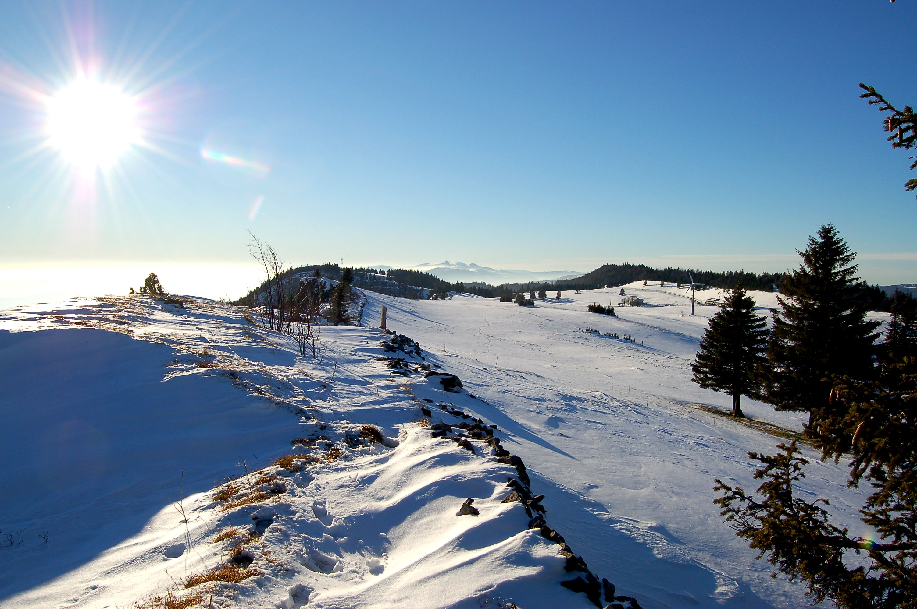 schöne Wanderung Weissenstein- Grenchenberg Biel